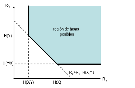 region de tasas